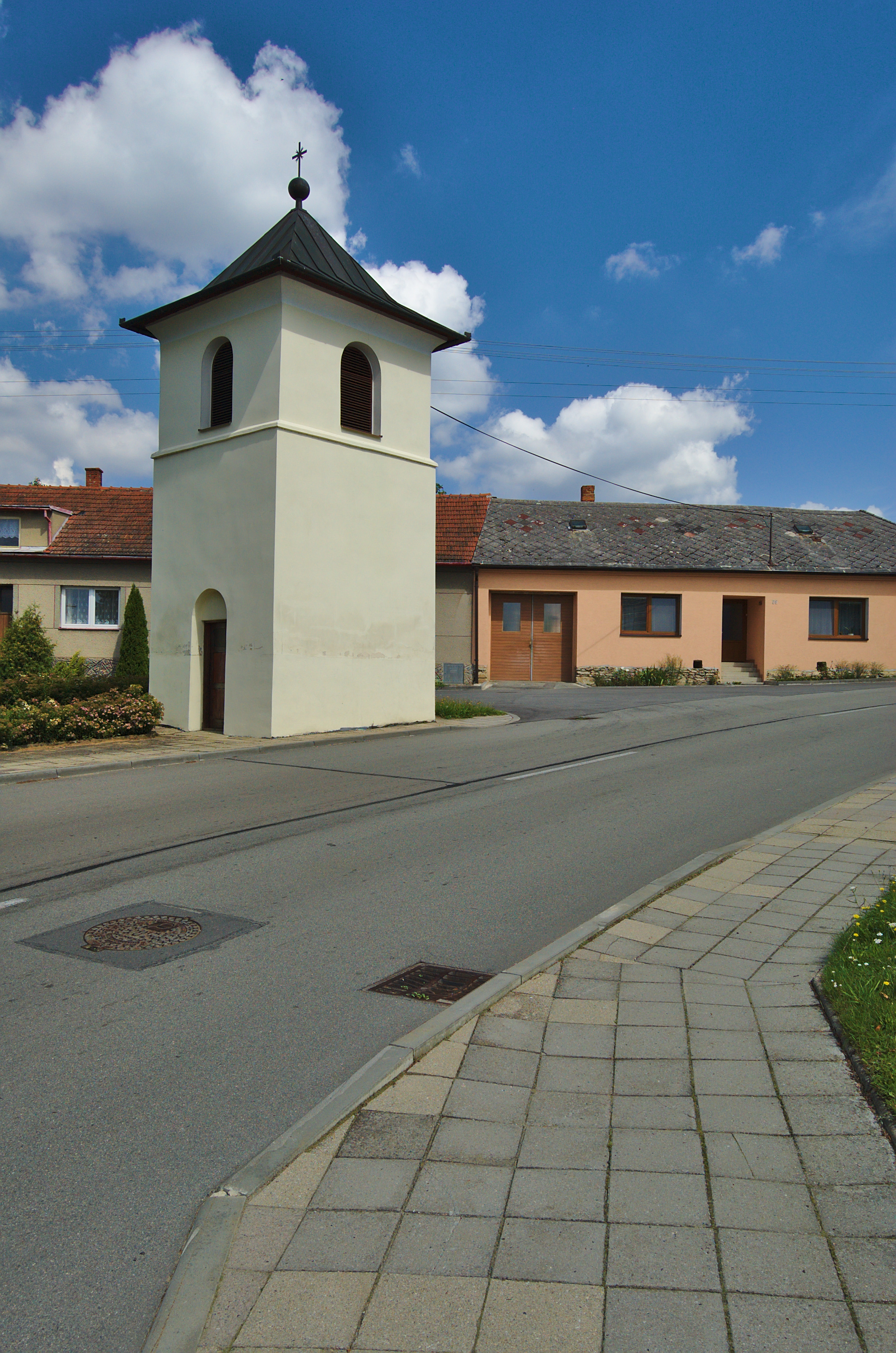 Zvonice, Okrouhlá, okres Blansko